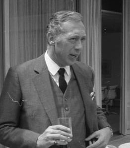 Bundeskanzler Willy Brandt empfängt Filmschauspieler Information added by Wikimedia users.